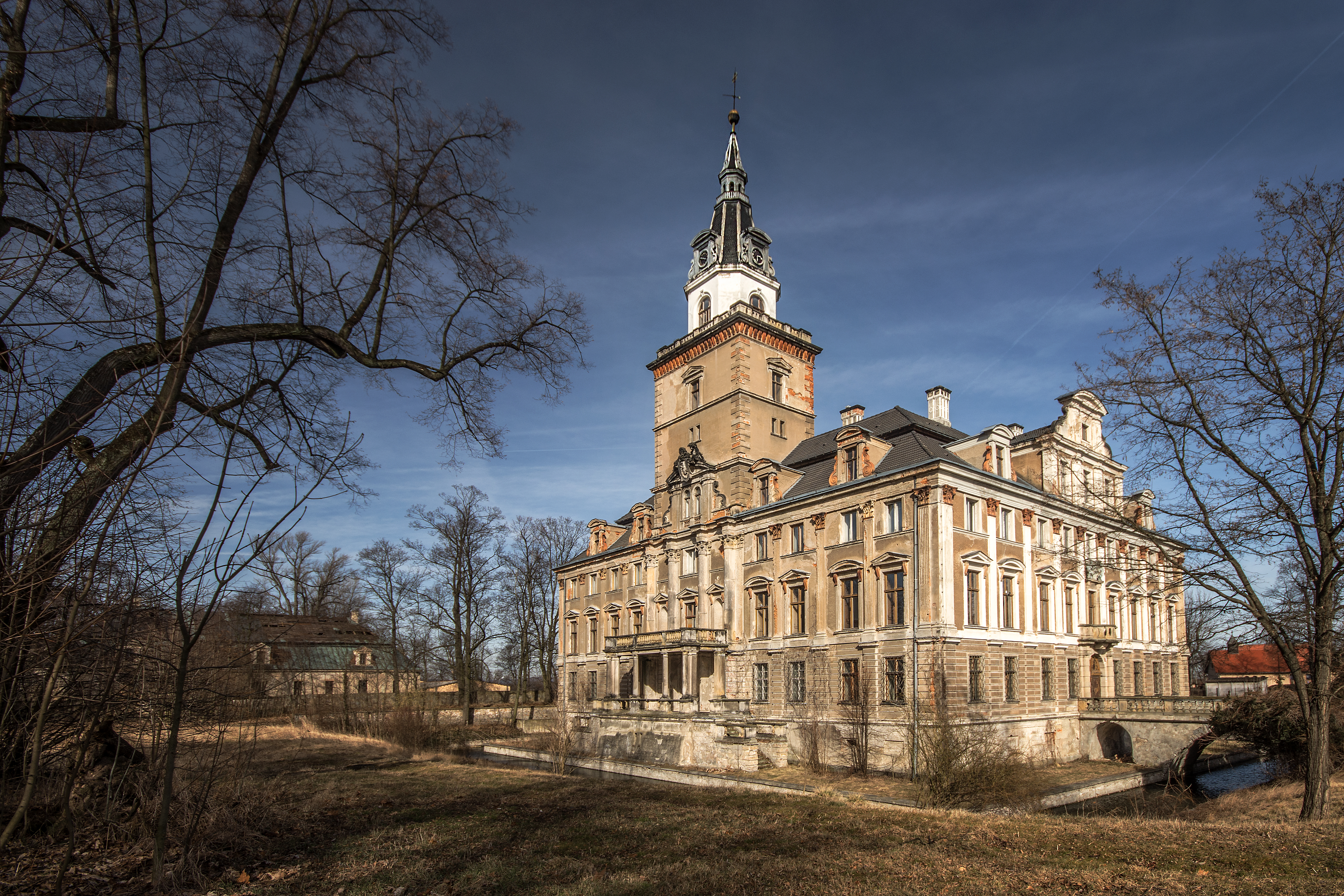 Roztoka, pałac, 1 poł. XVIII, XIX